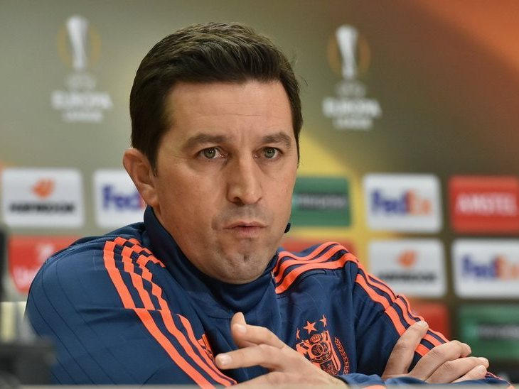 Беснік Хасі - тренер Андерлехта